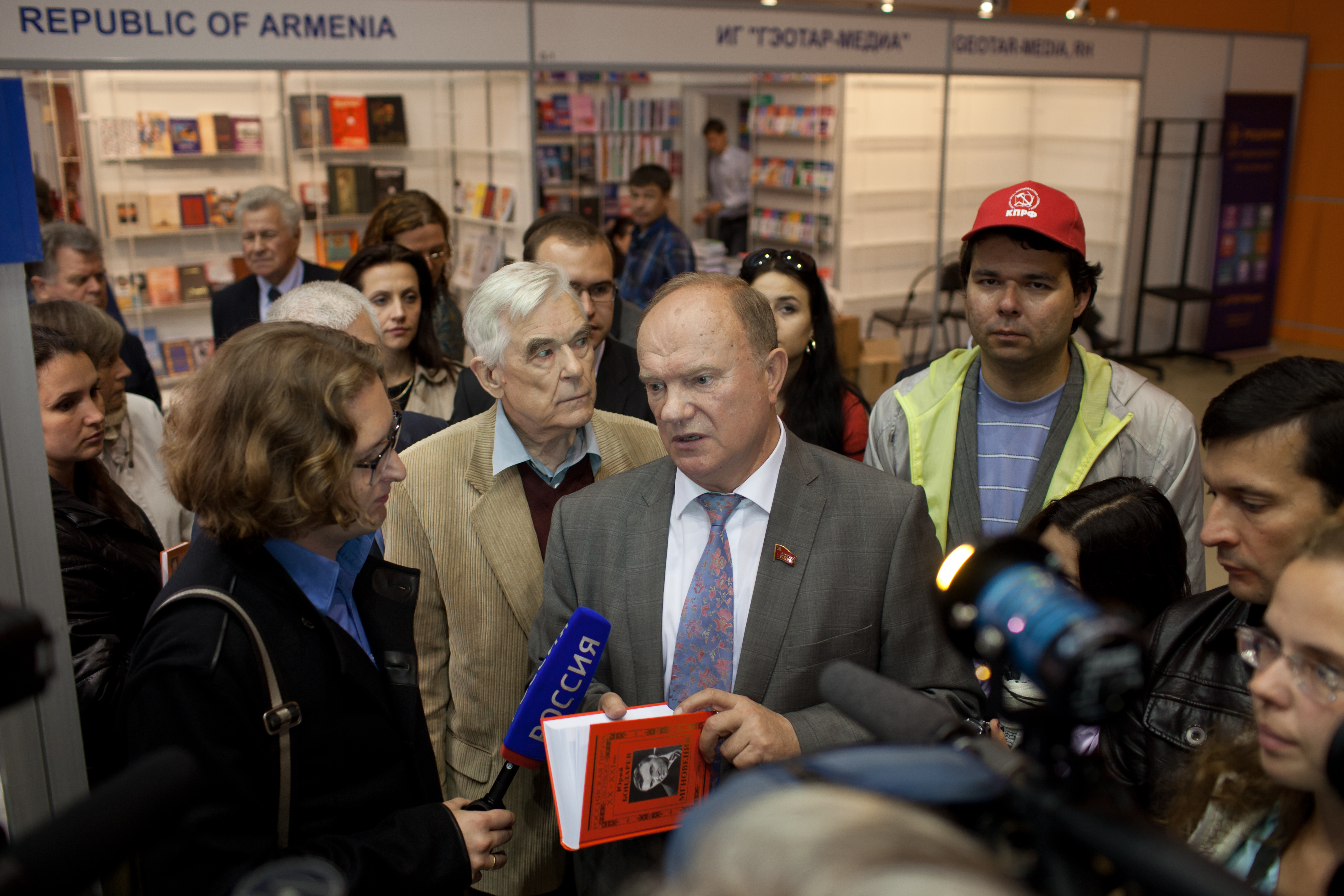 Московская международная выставка-ярмарка 2013